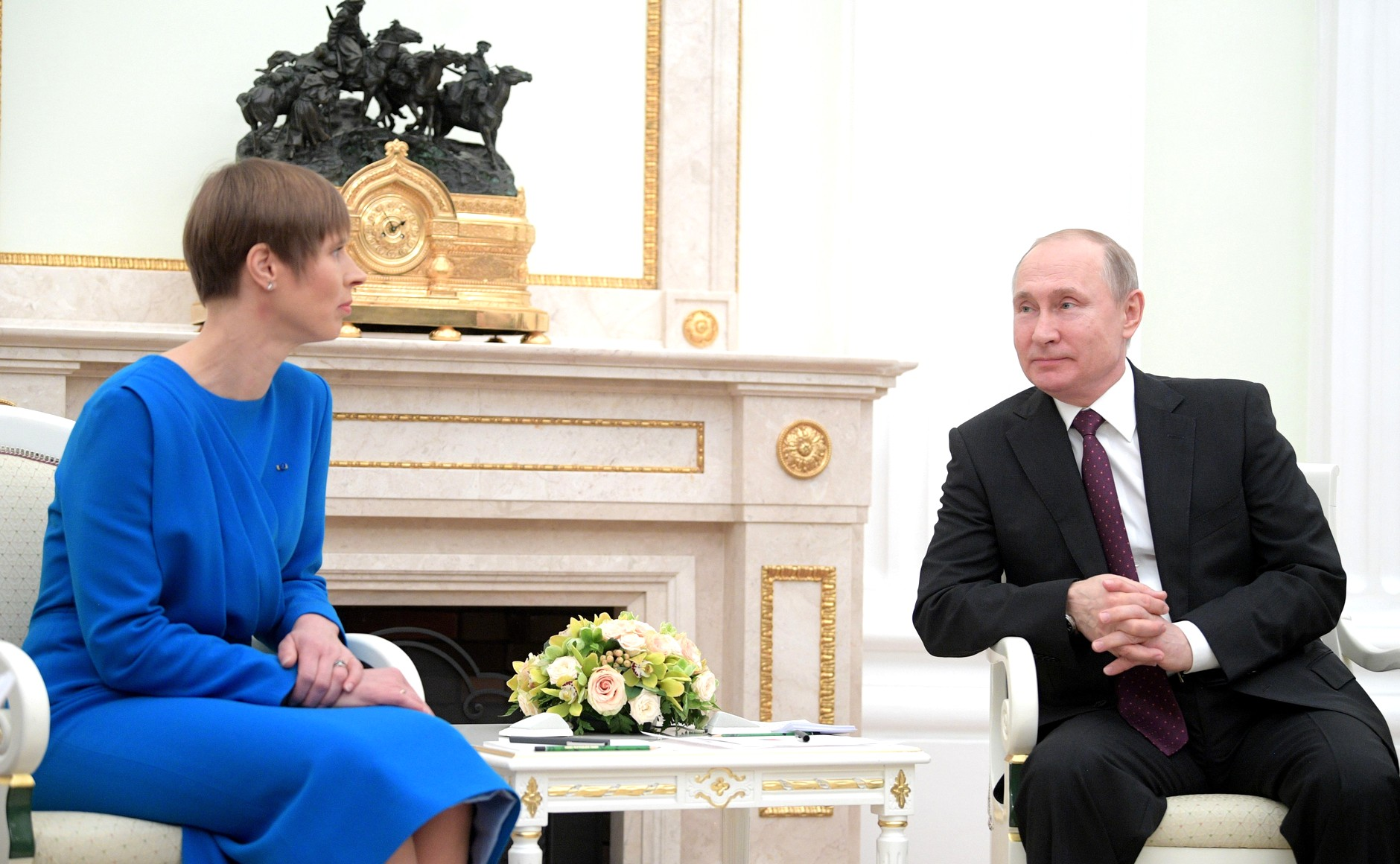 Встреча Президента Российской Федерации Владимира Путина с Президентом Эстонской Республики Керсти Кальюлайд